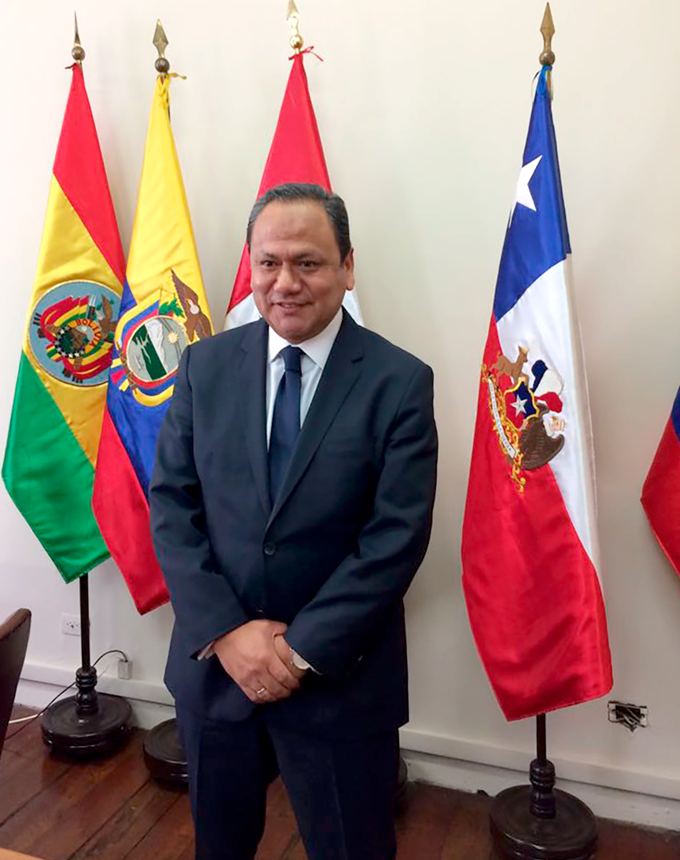 Vicepresidente del Parlamento Andino 2017-2018